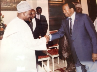 Son Excellence le Président du Cameroun Paul Biya avec Oumarou Fadil